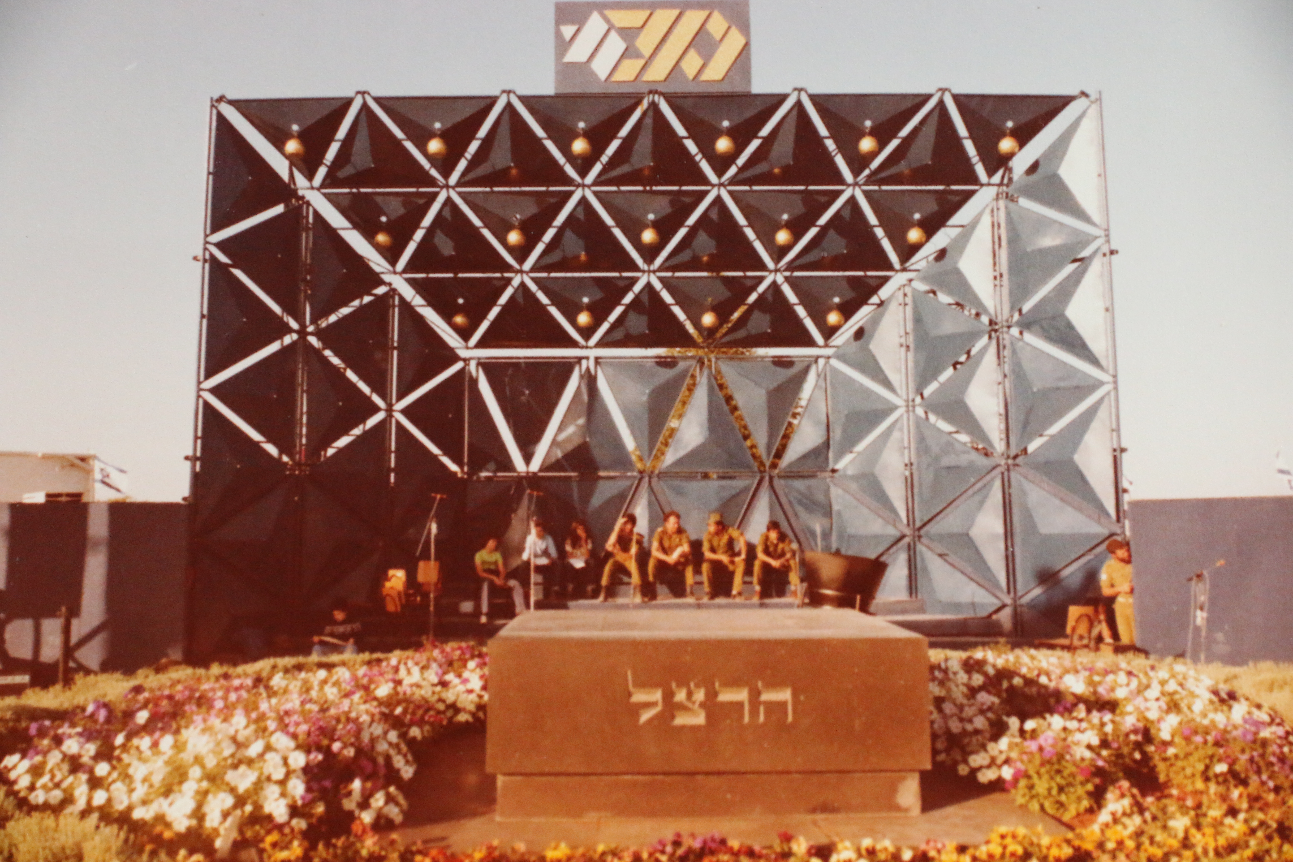 .טקס הדלקת המשואות בהר הרצל בסימן 30 שנה לעצמאות ישראל בניהולו של יהודה אילן